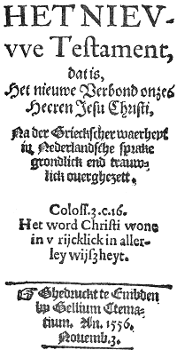 "Het Nieuwe Testament, dat is, Het nieuwe verbond onzes Heeren Jesu Christi. Na der Grieckscher waerheyt in Nederlandsche sprake grondlick ende trauwlick overghezett", Emden, Gellius Clemasius (Gilles van der Erven), 1556, in 12o